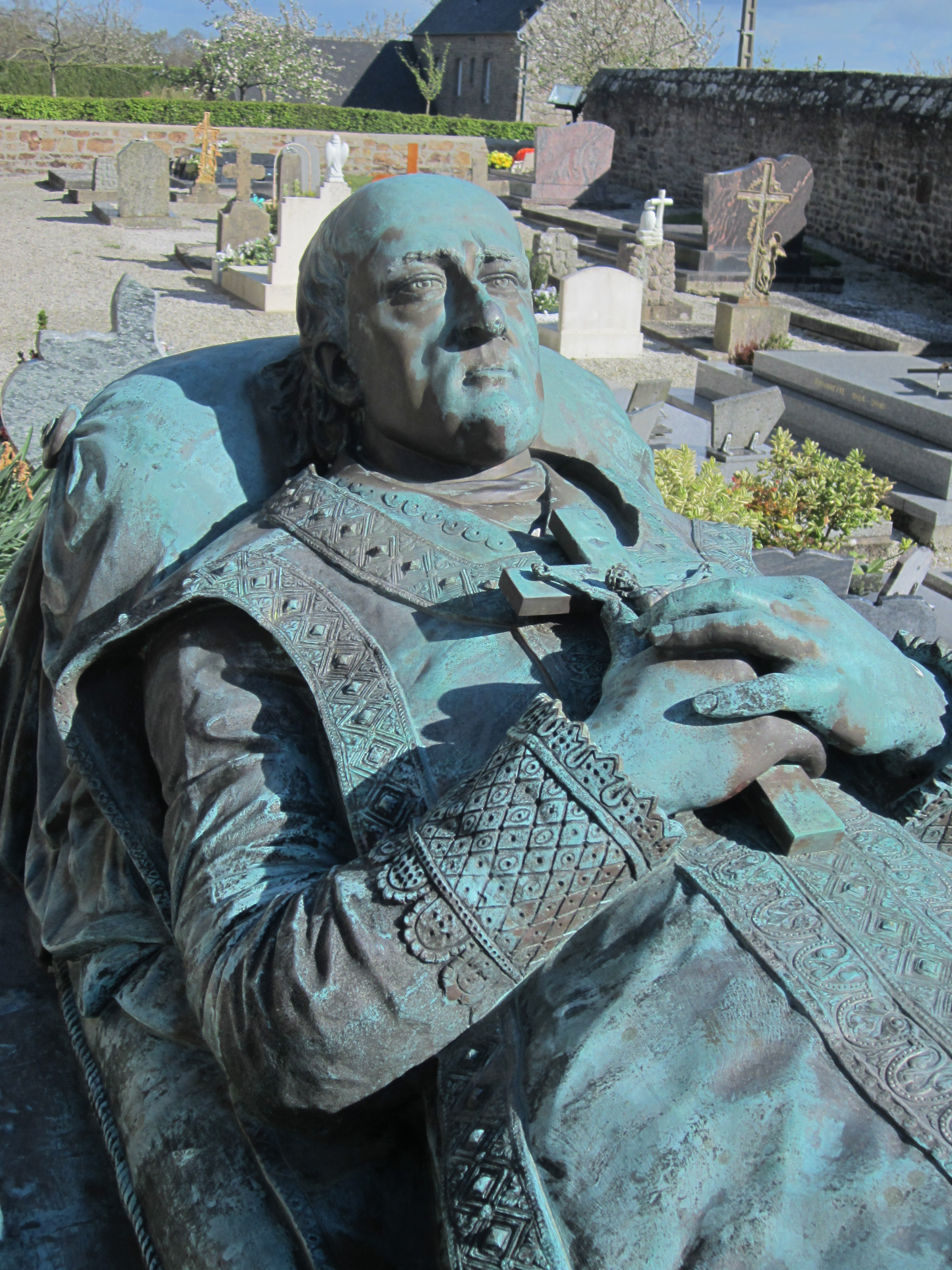 Montviron, Manche